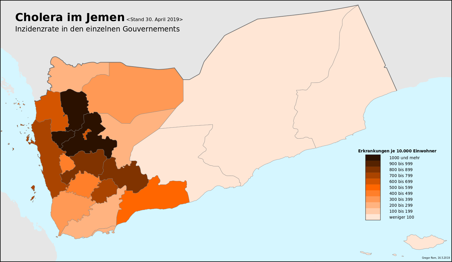 Cholera Jemen Inzidenzrate